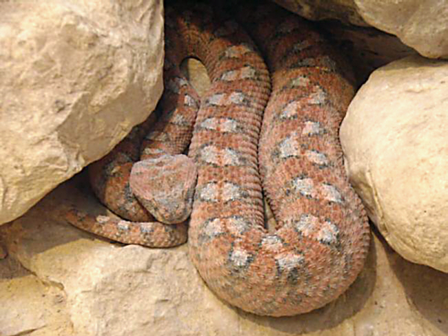 אפעה מגוון. רישיון נוצר על ידי משתמש:Androctonus